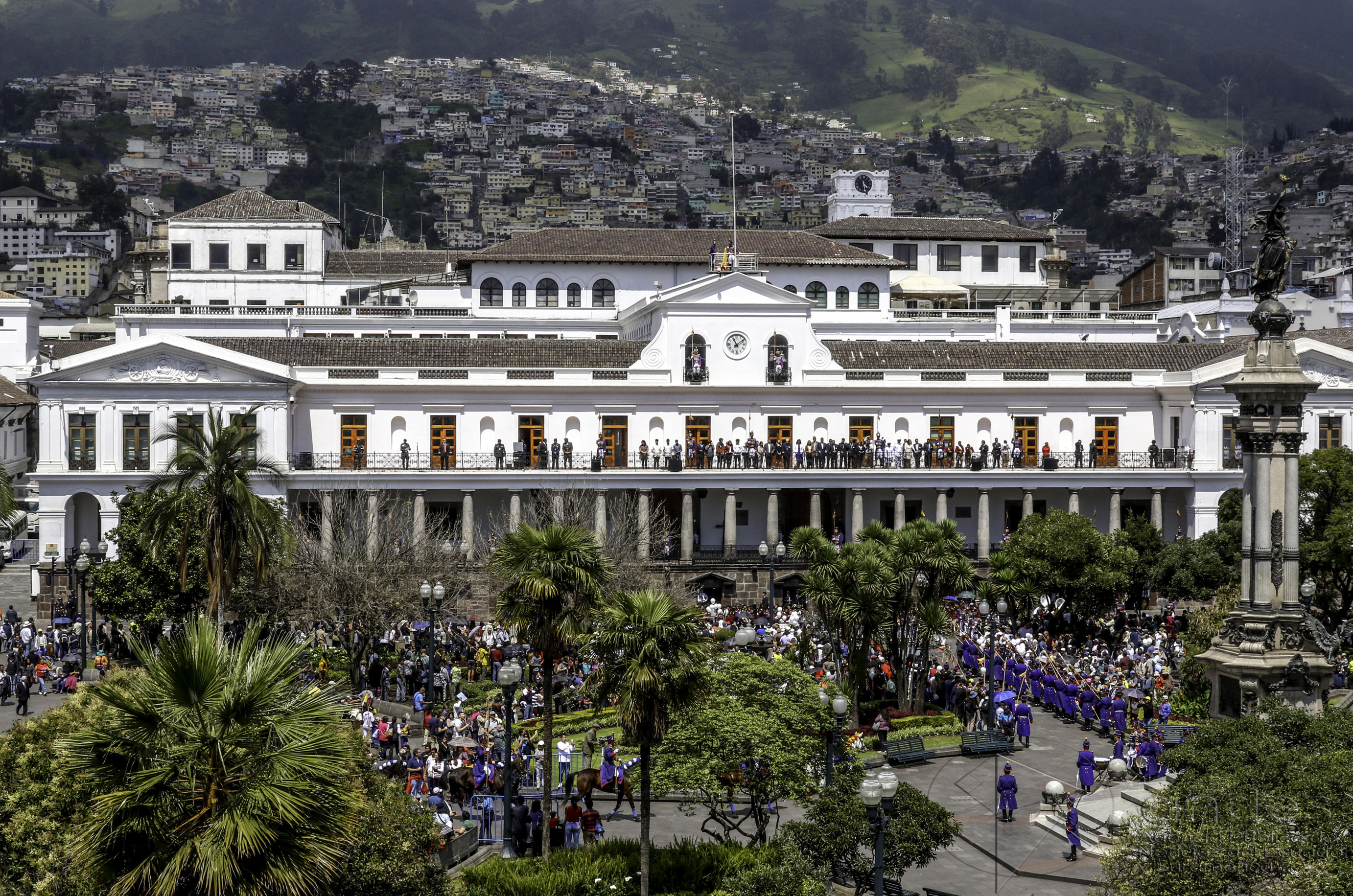 Quito, 16 enero 2017 (Andes).- Fachada del Palacio de Carondelet o Palacio de gobierno ubicado en la Plaza Grande, Centro Histórico de Quito. ANDES/Micaela Ayala V.